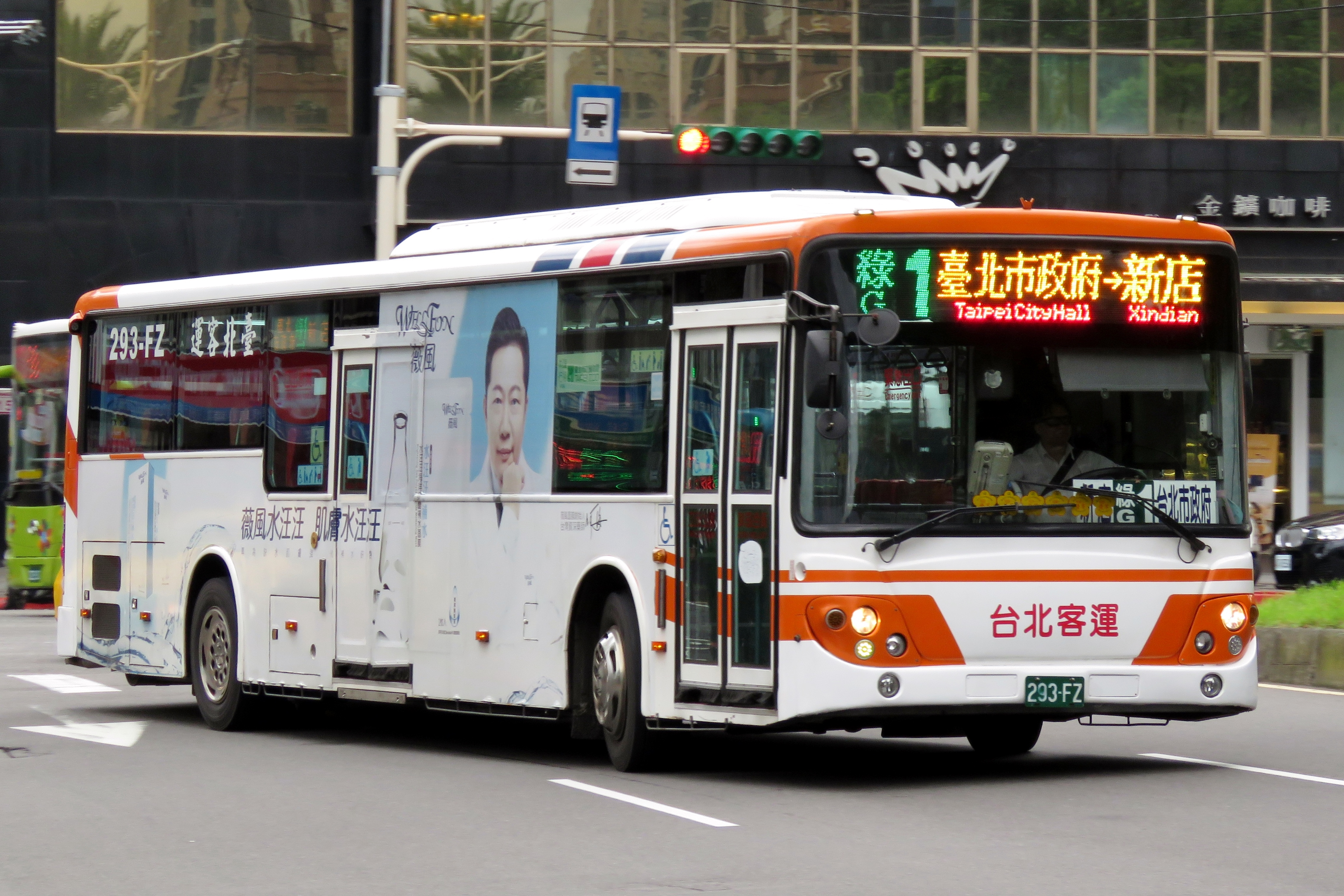 中文（台灣）: 2012 DAEWOO BS120CN